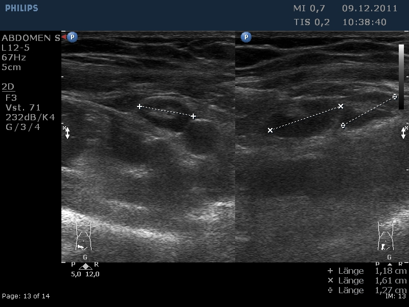 Ultraschallbild vergrößerter Lymphknoten im rechten Unterbauch. Lymphadenitis mesenterialis